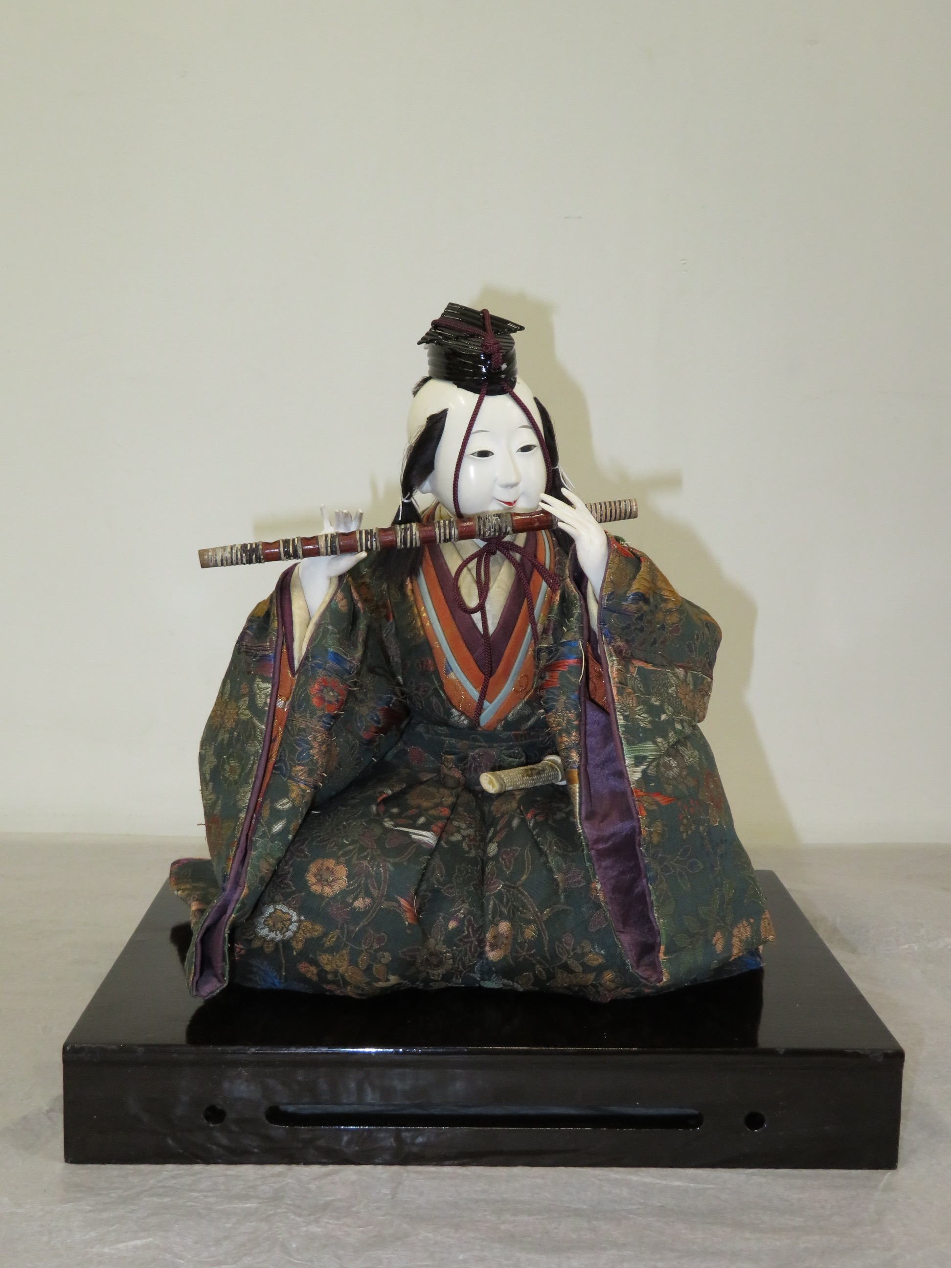 2018年2月27日-3月18日 東京国立博物館展示風景